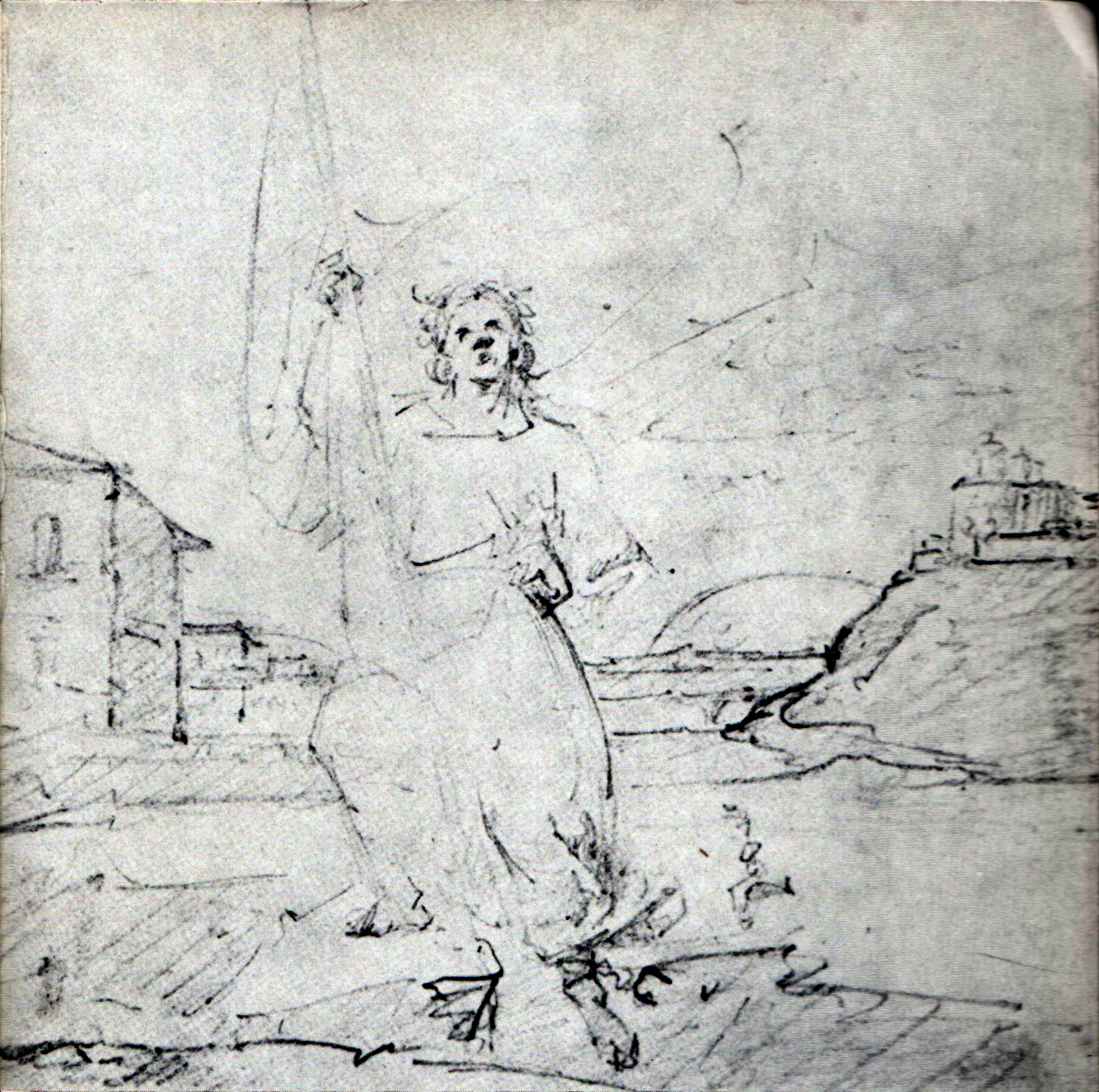 România revoluționară - schiță făcută la Roma, desen, 0,21x0,16m - Muzeul Gheorghe Tattarescu